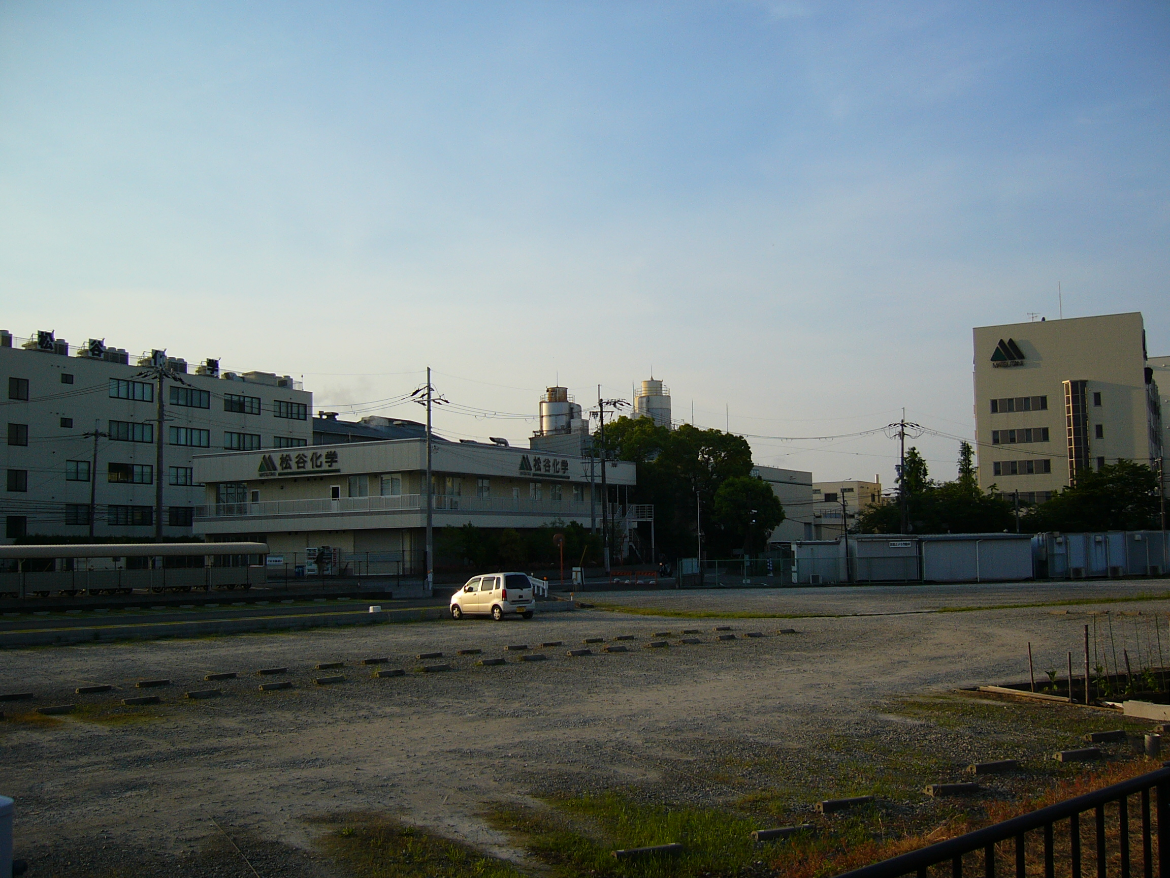 駐車場からの撮影